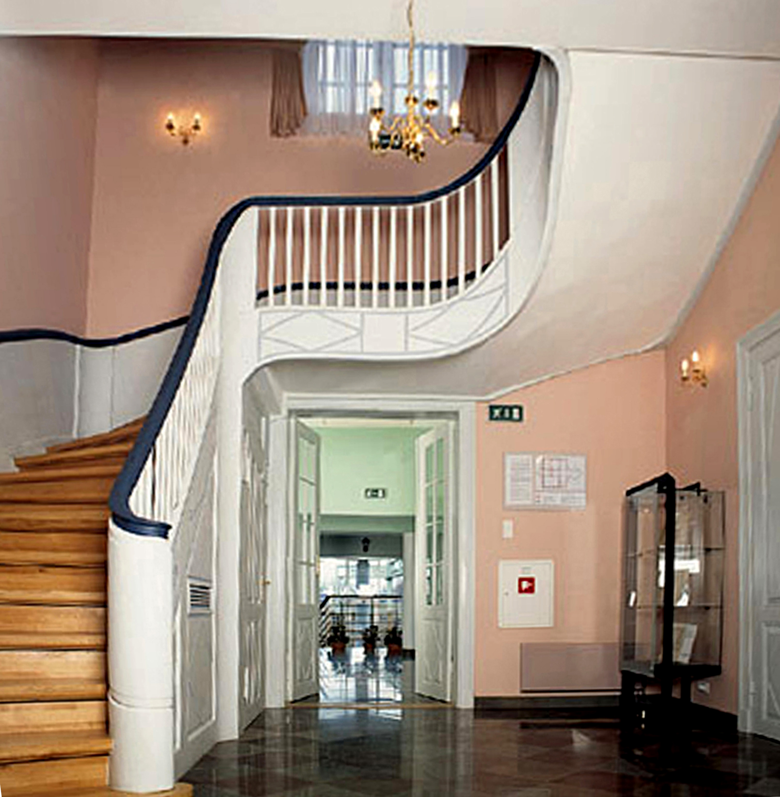 Zespół dworu Młyniska został zaadaptowany dla potrzeb Zespołu Elektrociepłowni Gdańsk, a wnętrza zostały odrestaurowane, stan w 2000 r.